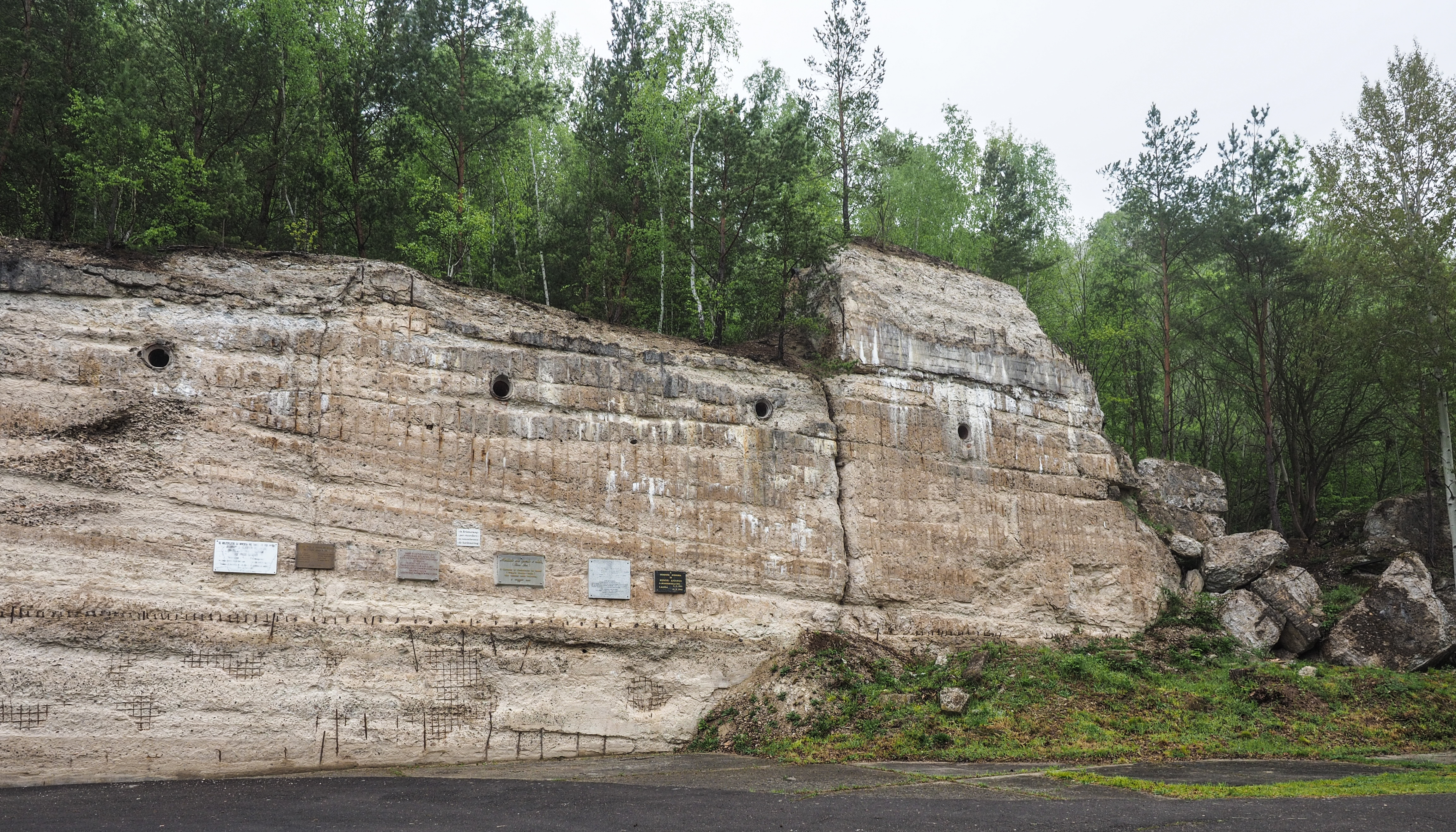 Ehemalige Rüstungsfabrik REIMAHG bei Kahla, Thüringen